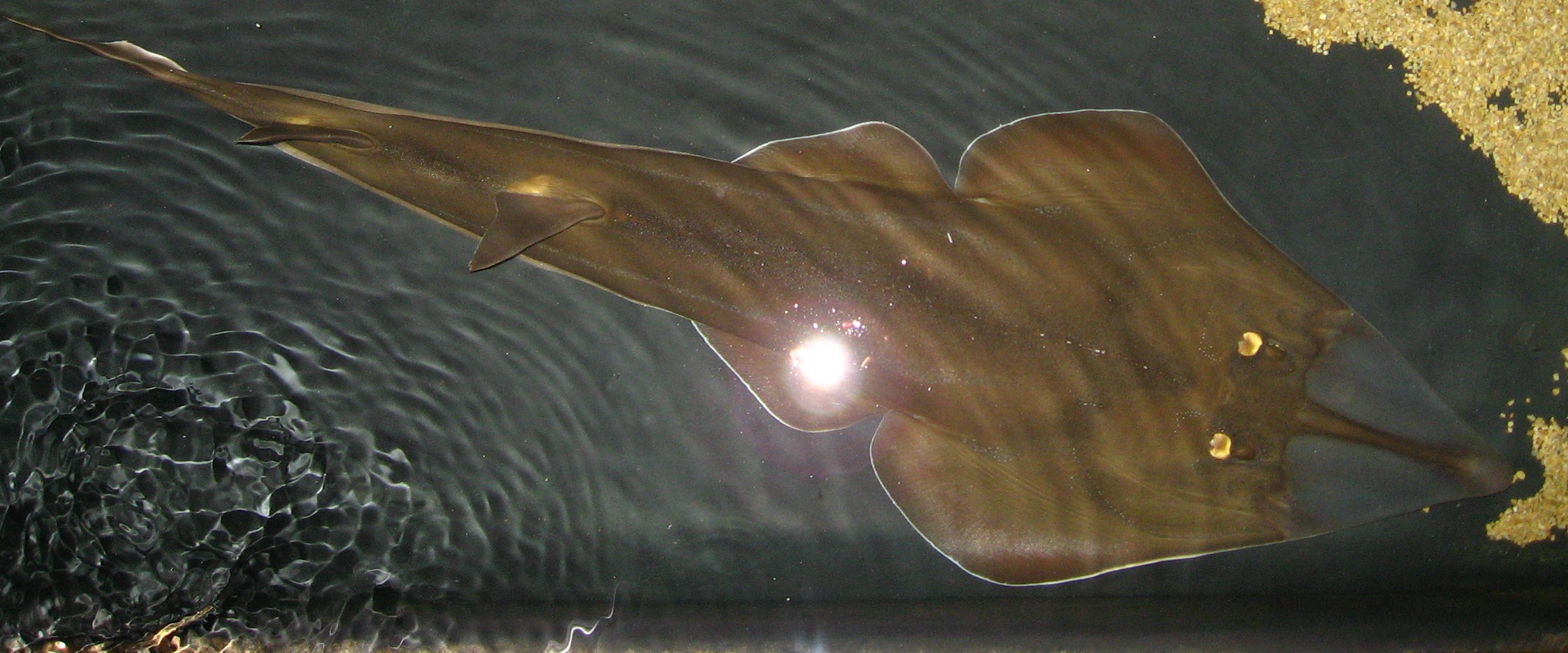 Rhinobatos cemiculus in Nausicaä Centre National de la Mer